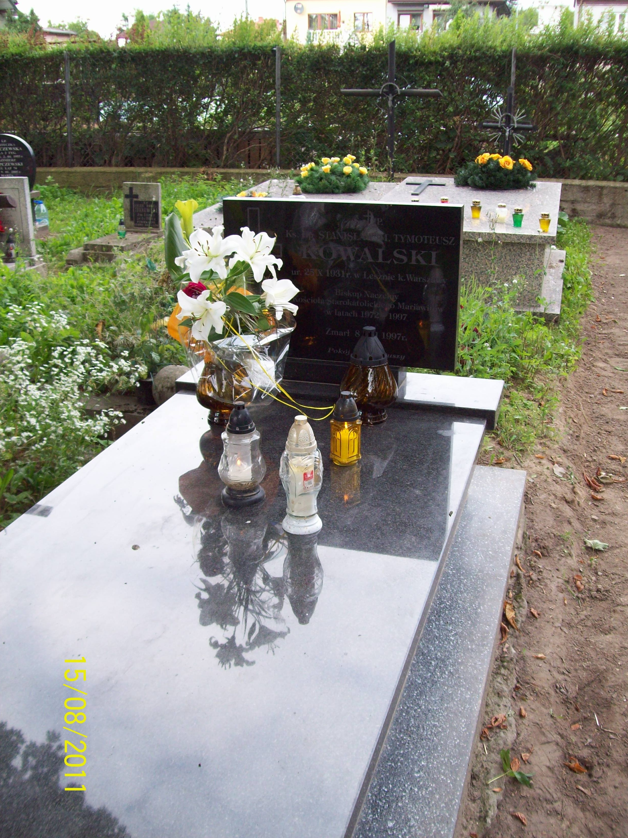 Nagrobek Biskupa Naczelnego Kościoła Starokatolickiego Mariawitów, Stanisława Marii Tymoteusza Kowalskiego na cmentarzu mariawickim w Płocku.